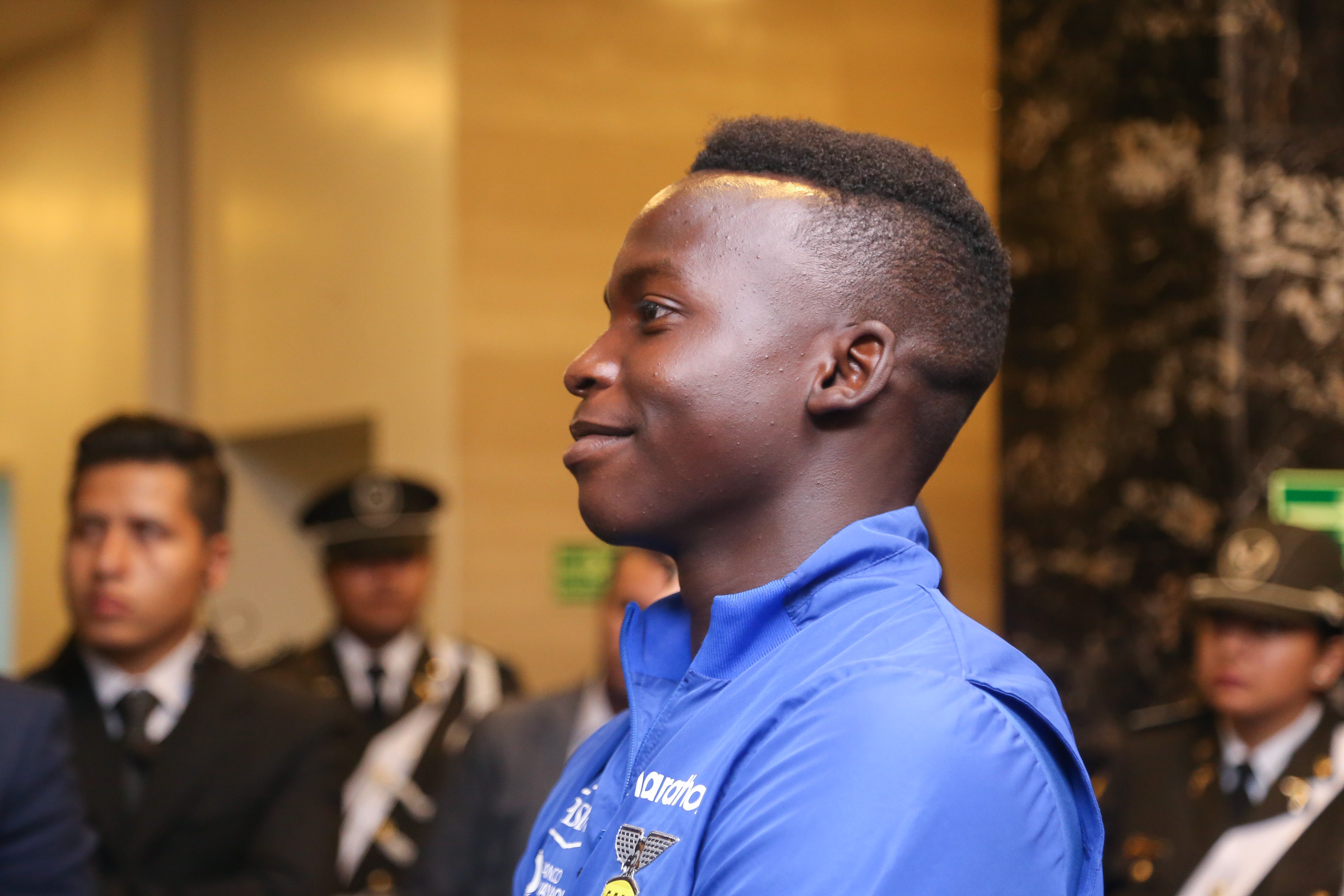 Quito, 25 de junio 2019.- Condecoración “Dr. Vicente Rocafuerte” al Mérito Deportivo a la Selección Sub 20 de Fútbol del Ecuador, y a su cuerpo técnico y directivos. Fotos: Andrés Estrella. Quito, 25 de junio 2019.- Condecoración “Dr. Vicente Rocafuerte” al Mérito Deportivo a la Selección Sub 20 de Fútbol del Ecuador, y a su cuerpo técnico y directivos. Fotos: Andrés Estrella.